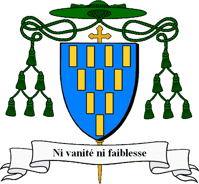 En glazur e zek kanochenn en aour, 4, 3, 2, 1